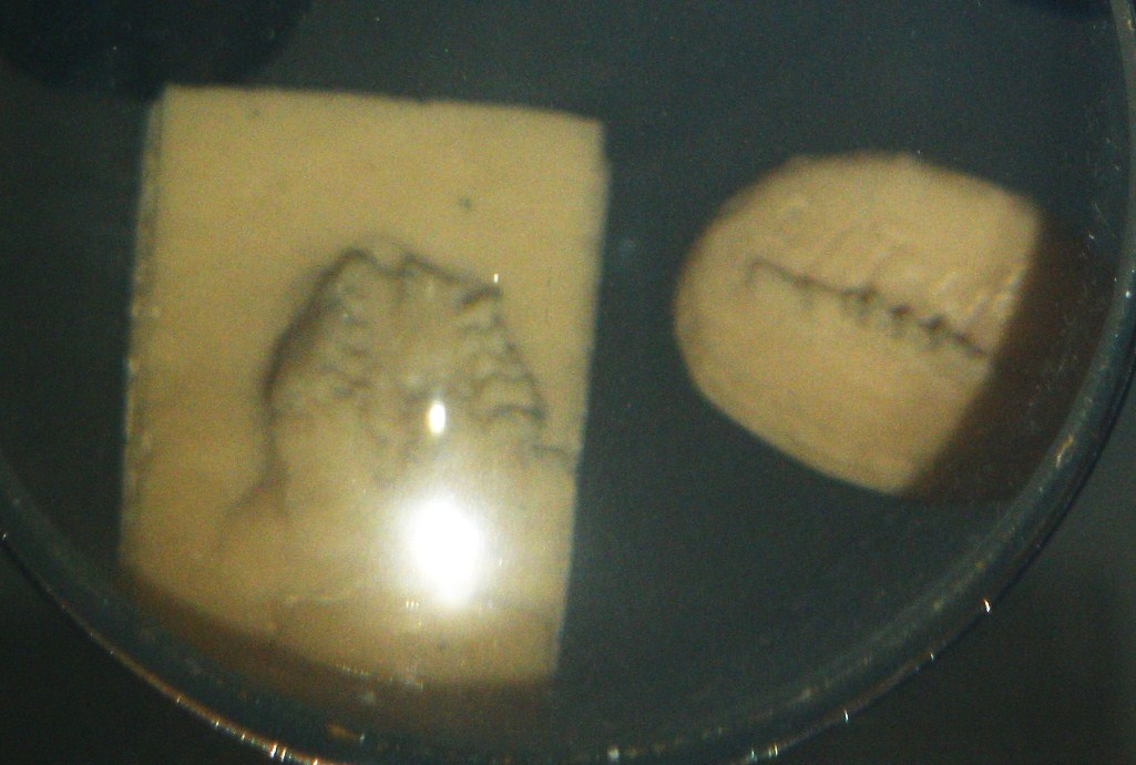 Fossil of Kennalestes, an extinct mammal- Took the picture at Museo di Paleontologia di Firenze